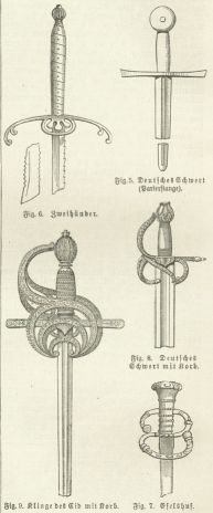 Grafik mittelalterlicher Schwerter.